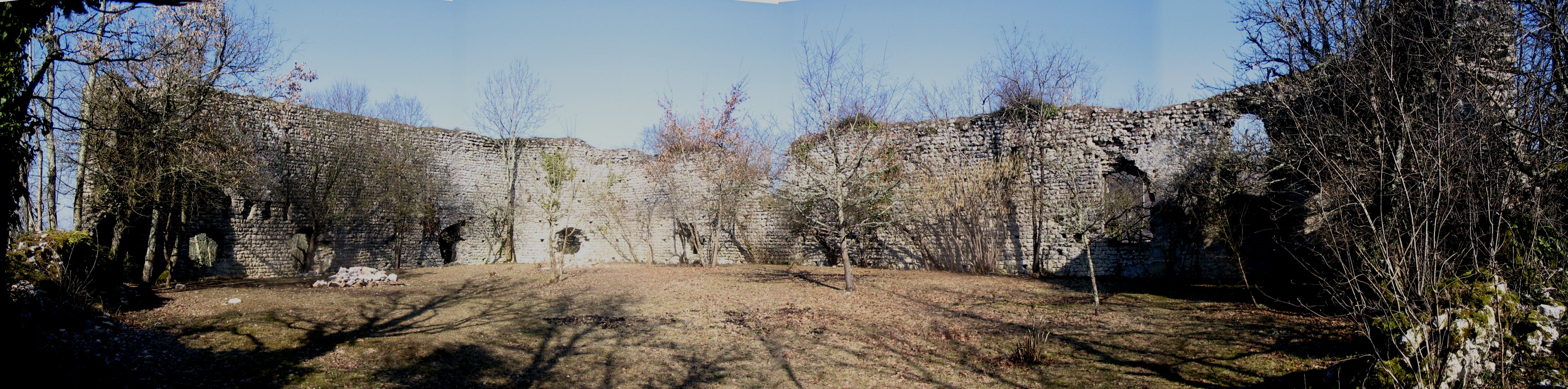 Château de Cordon - Brégnier-Cordon, dans le département de l'Ain. France.